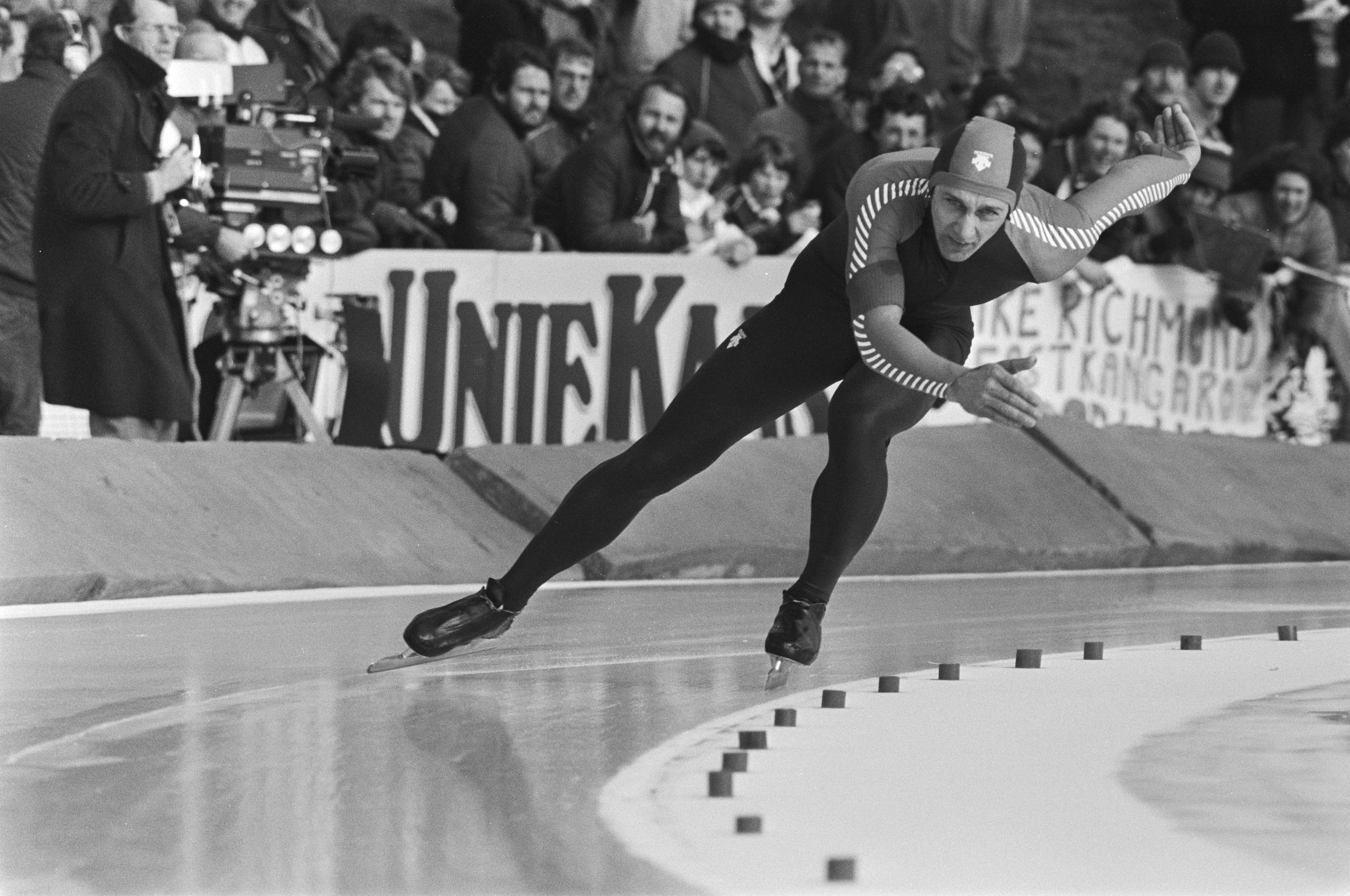 Collectie / Archief : Fotocollectie Anefo Reportage / Serie : [ onbekend ] Beschrijving : WK Sprint schaatsen in Alkmaar. Lieuwe de Boer in aktie Datum : 6 februari 1982 Locatie : Alkmaar, Noord-Holland Trefwoorden : schaatsen Persoonsnaam : Boer, Lieuwe de Fotograaf : Bogaerts, Rob / Anefo Auteursrechthebbende : Nationaal Archief Materiaalsoort : Negatief (zwart/wit) Nummer archiefinventaris : bekijk toegang 2.24.01.05 Bestanddeelnummer : 931-9573